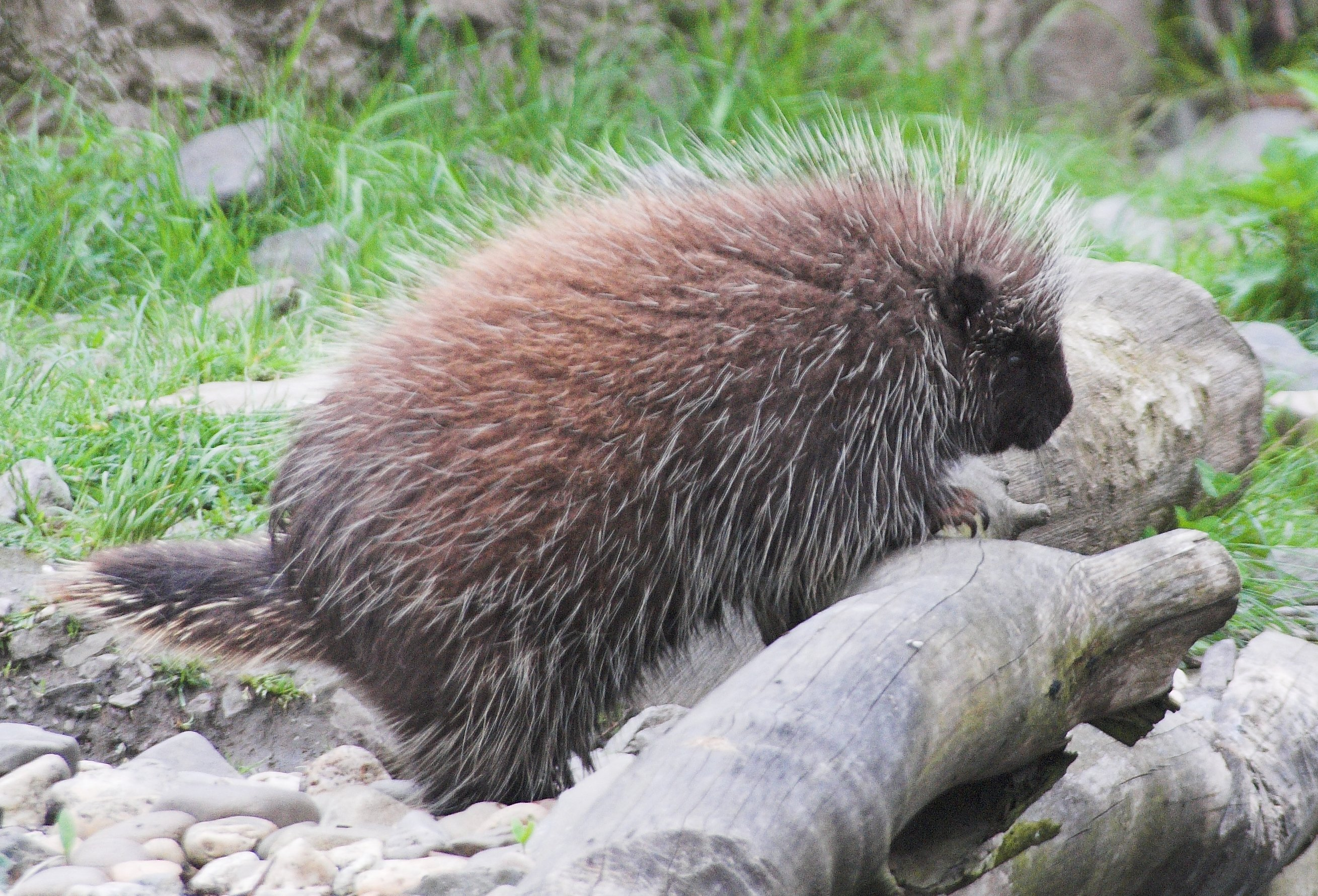 Ein Baumstachler in der ZOOM-Erlebniswelt (Gelsenkirchen)